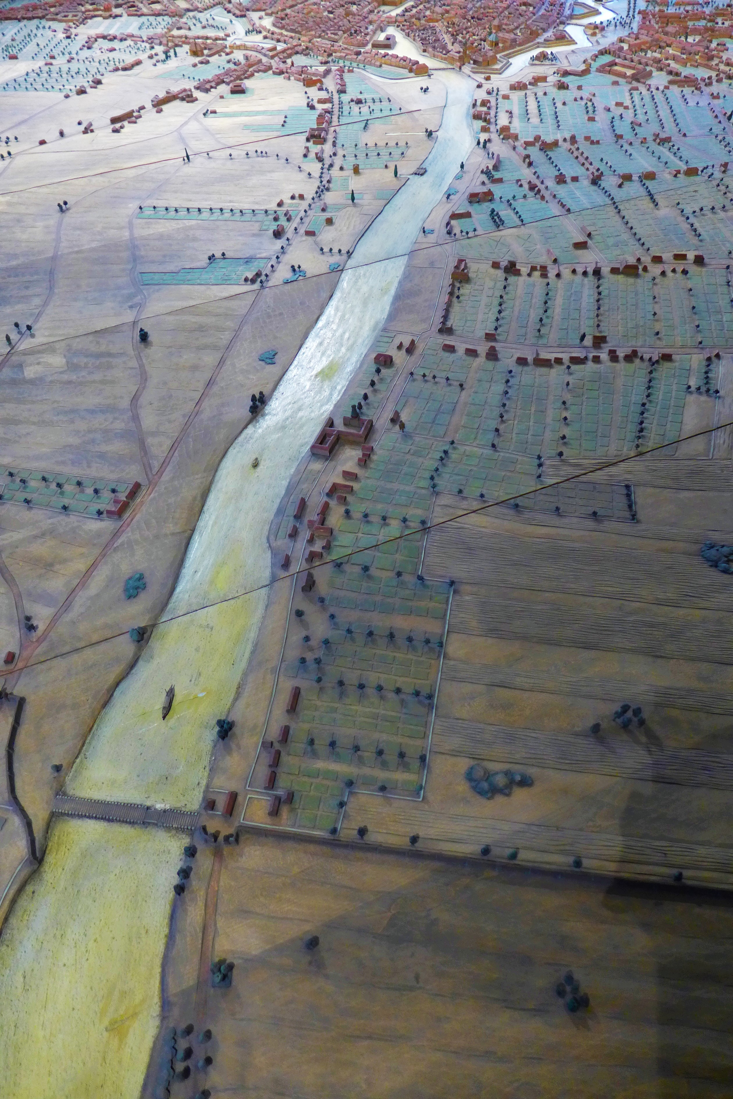 Oberbaumbrücke Berlin, Postion im städtischen Umfeld um das Jahr 1770, Stadtmodell im Märkischen Museum